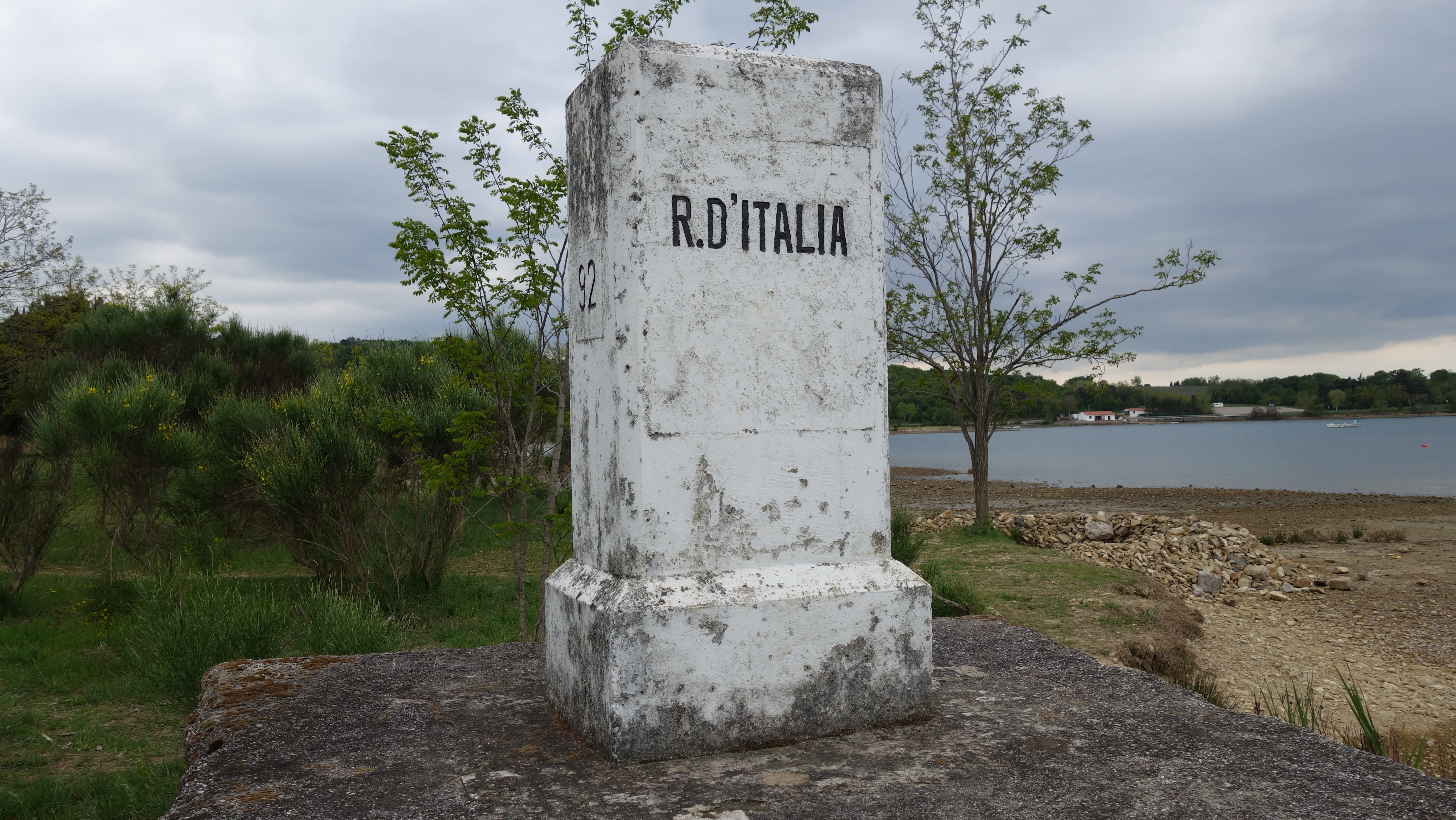 Border at Lazaret (ITA-SLO) 5